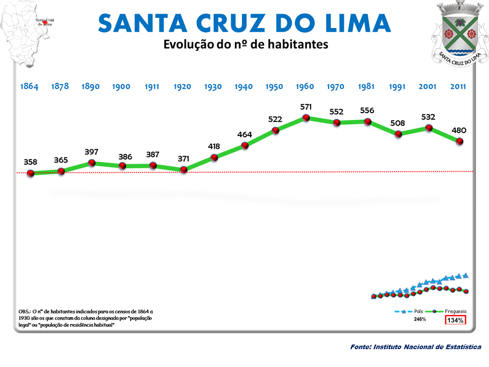 Censos 1864/2011